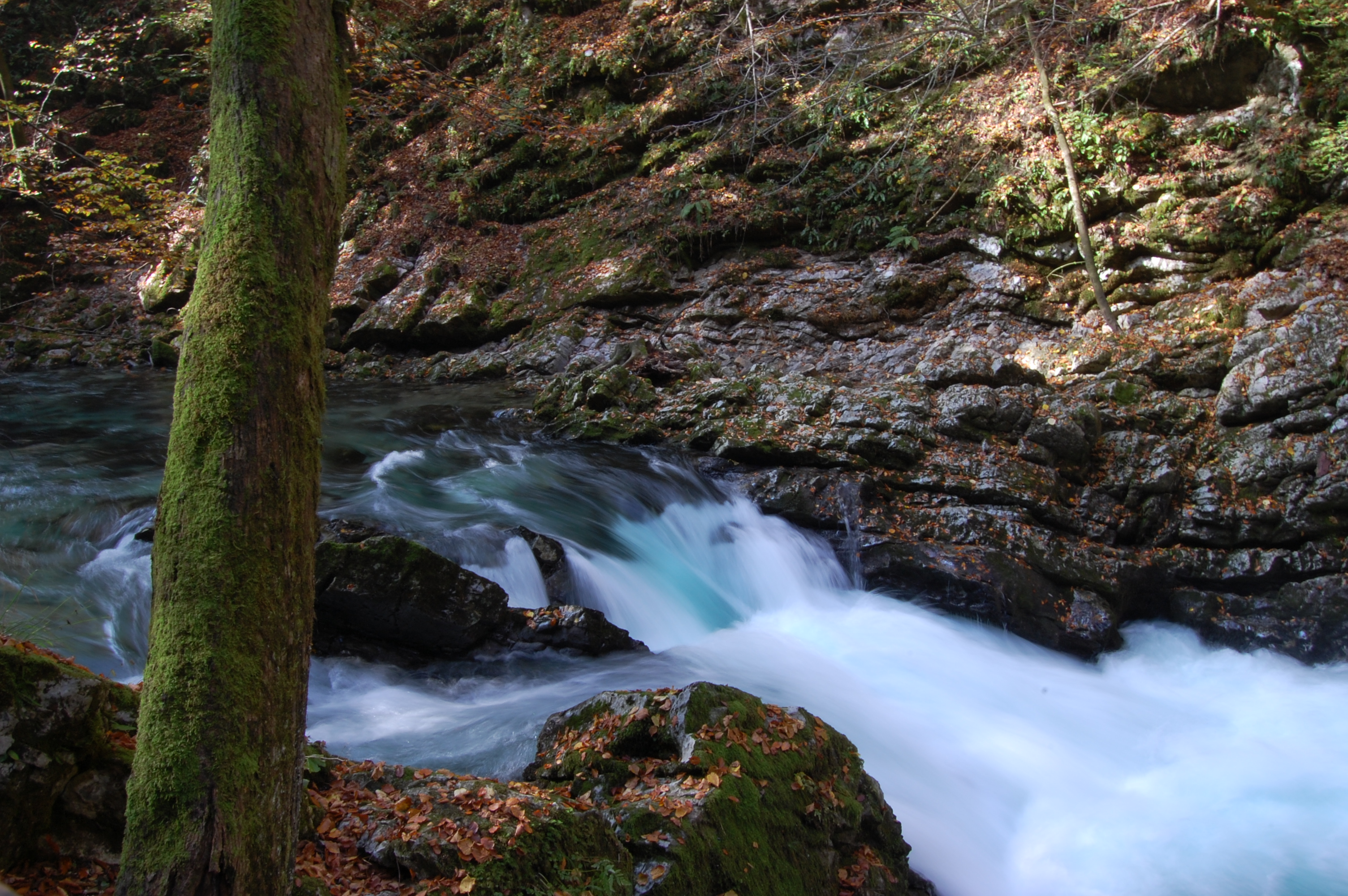 Blejski Vintgar. Taken in autumn 2007